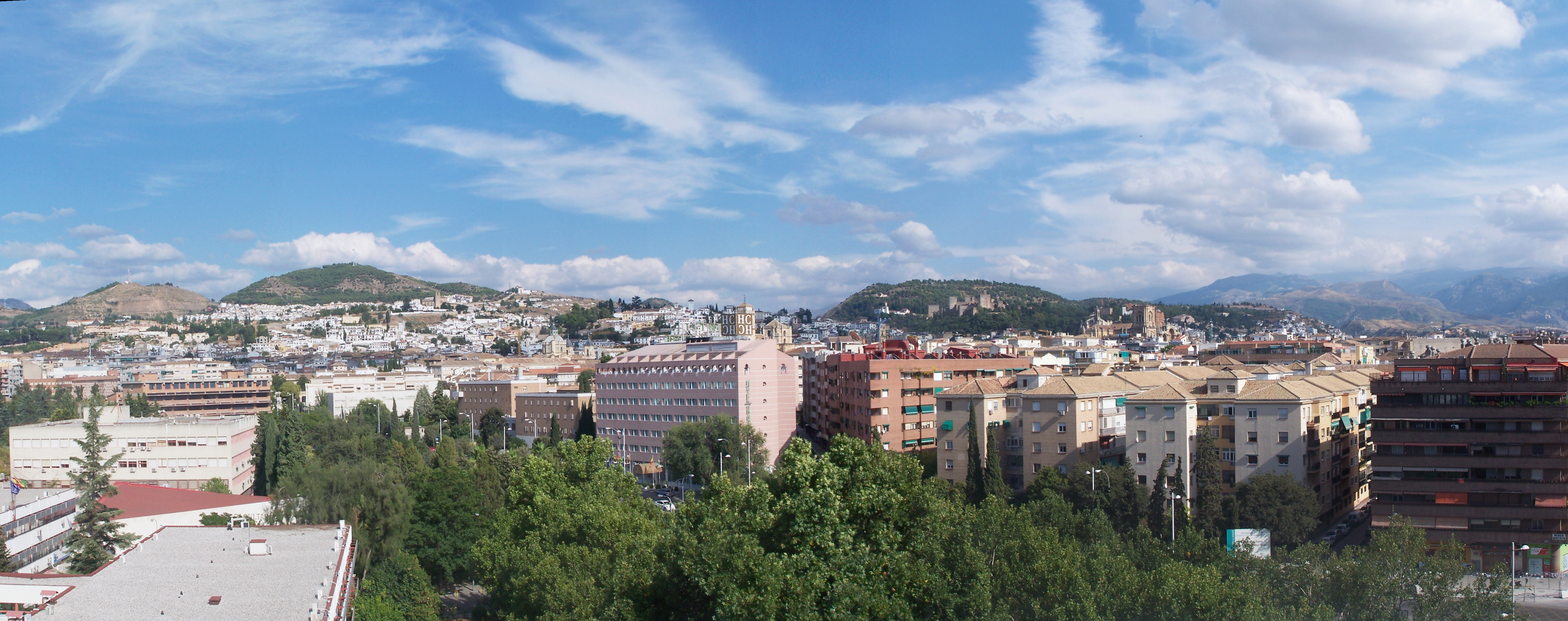 Panorámica obtenida uniendo 8 fotografías de Granada (España), Panoramic view of Granada